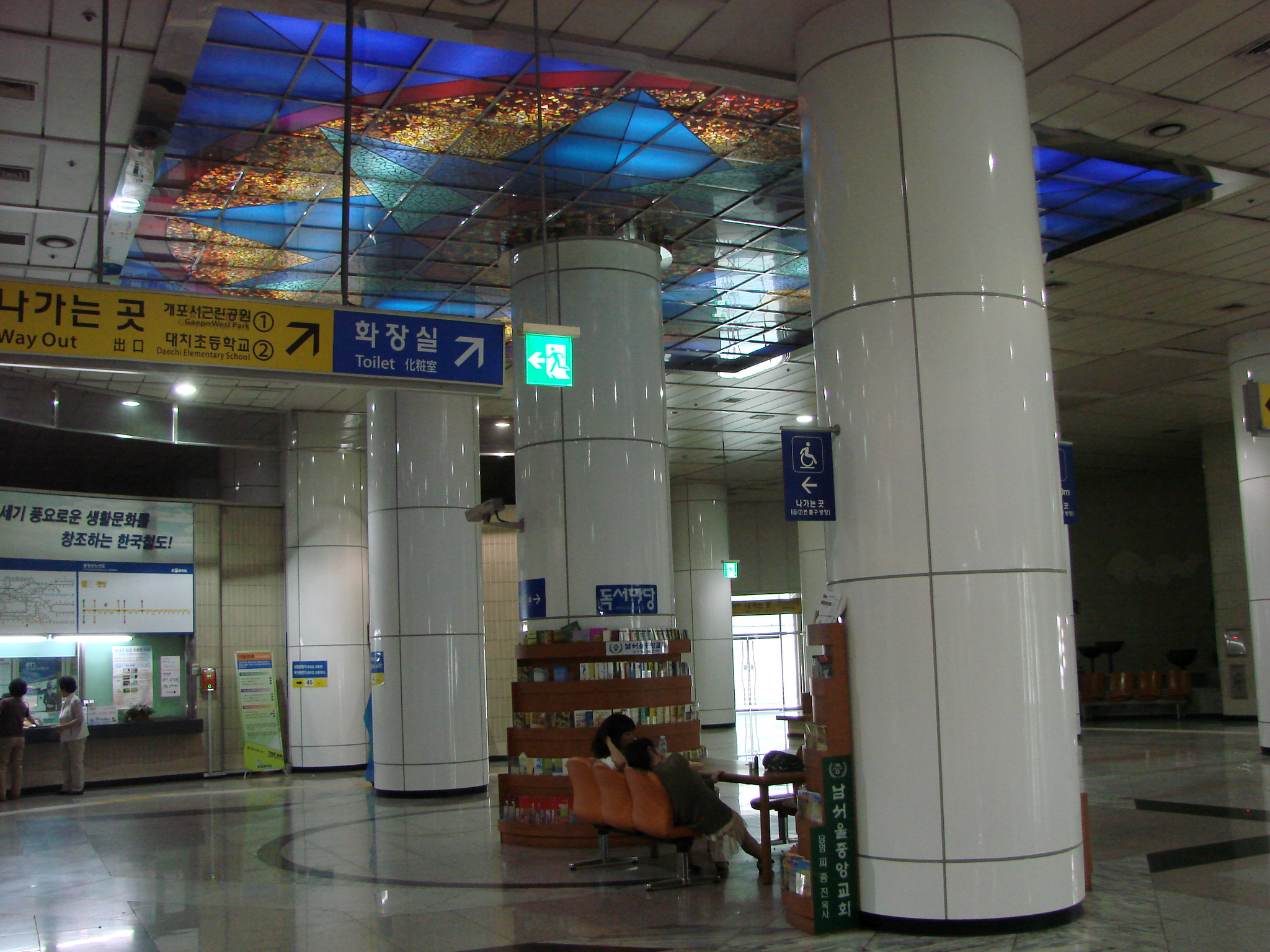 수도권 전철 분당선 개포동역 로비